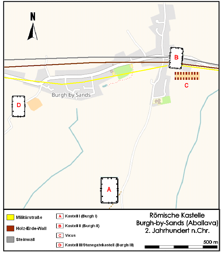 Lageskizze der römischen Kastelle von Burgh-by-Sands (Aballava), Hadrianswall, England, 2. Jahrhundert n.Chr.